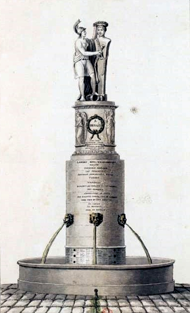 Fontaine érigée à la gloire du général Desaix, place Desaix (actuelle place Dauphine) à Paris. Dessin à la plume et lavis à l'encre de Chine, rehauts d'aquarelle, 26,5 x 16 cm, en provenance de la collection Hippolyte Destailleur.